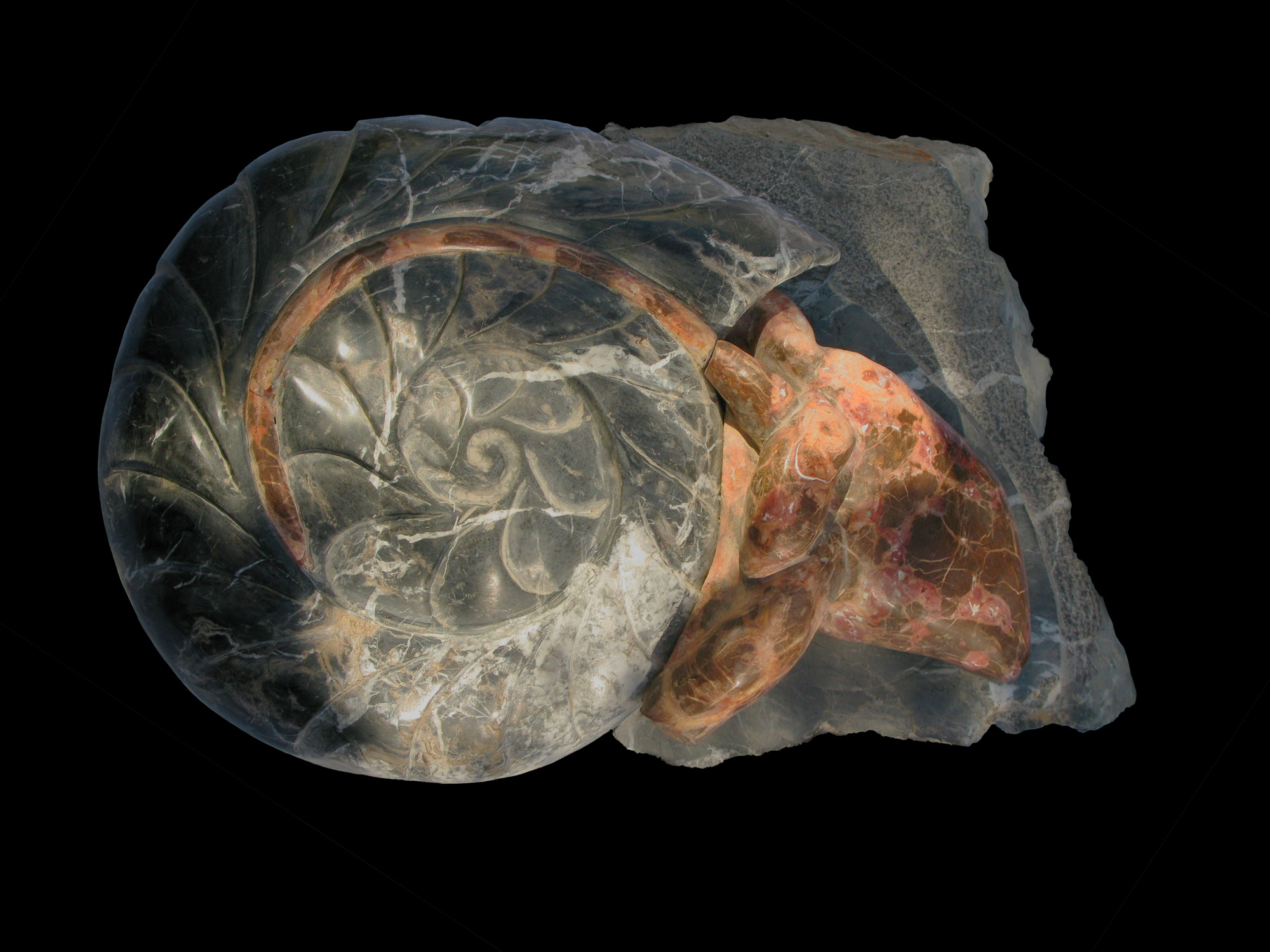 פסל שיצר אלי אהרון